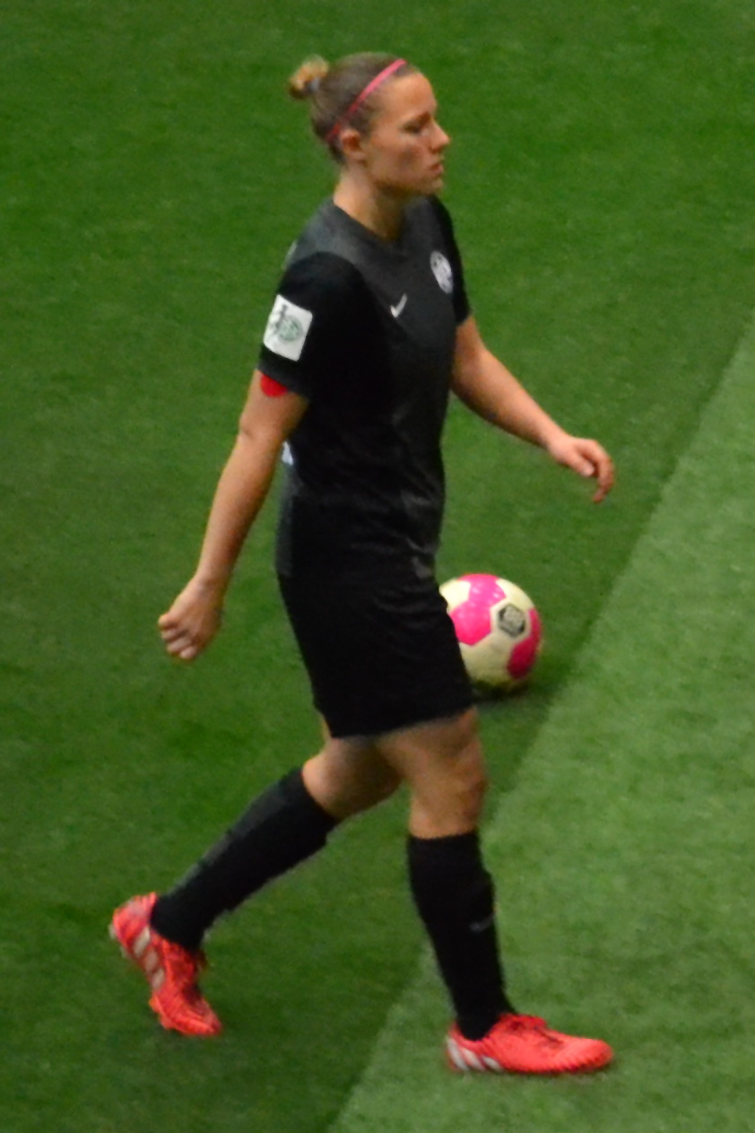 Isabel Hochstein (SGS Essen) beim SAP Frauen-FußballCup 2016